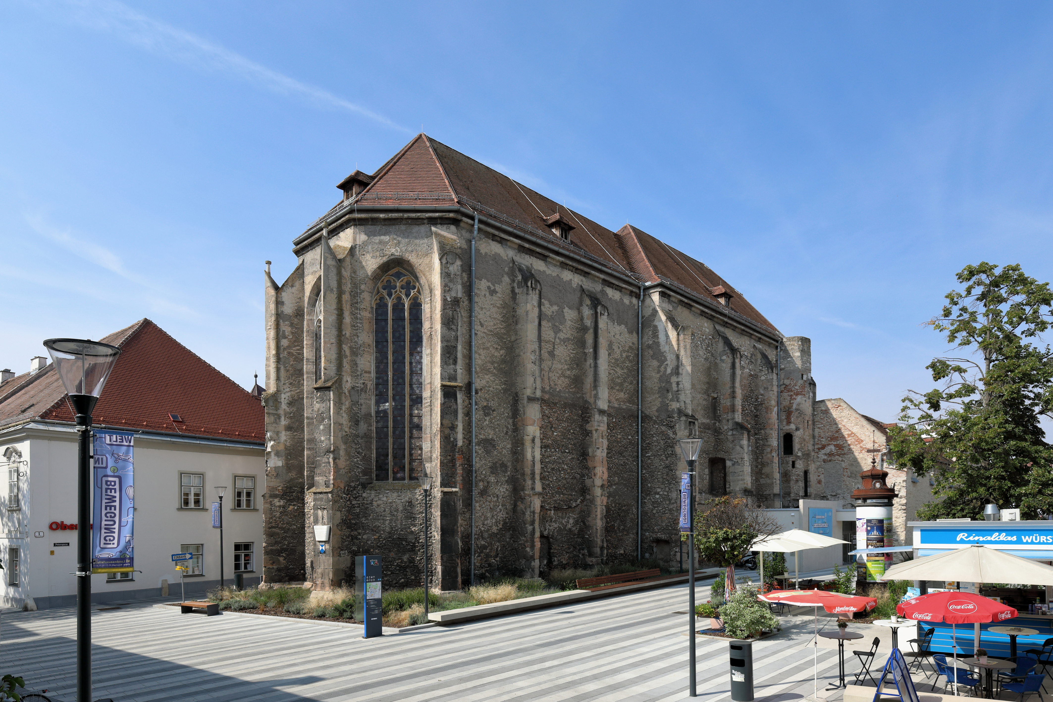 Ostnordostansicht der ehemaligen Klosterkirche der Dominikanerinnen „St. Peter an der Sperr“ in der niederösterreichischen Bezirkshauptstadt Wiener Neustadt.Die Kirche wurde im 3. Viertel des 14. Jahrhunderts errichtet. 1768 wurde sie bei einem Erdbeben stark beschädigt. In weiterer Folge wurde die Kirche geschlossen und profaniert. Weitere Beschädigung erfolgten beim Stadtbrand 1834, wo das Gewölbe einstürzte, und 1944 durch Bombentreffer. 1965/66 wurde die ehemalige Kirche nach Plänen von Wilhelm Zotti restauriert und als Ausstellungshalle adaptiert.